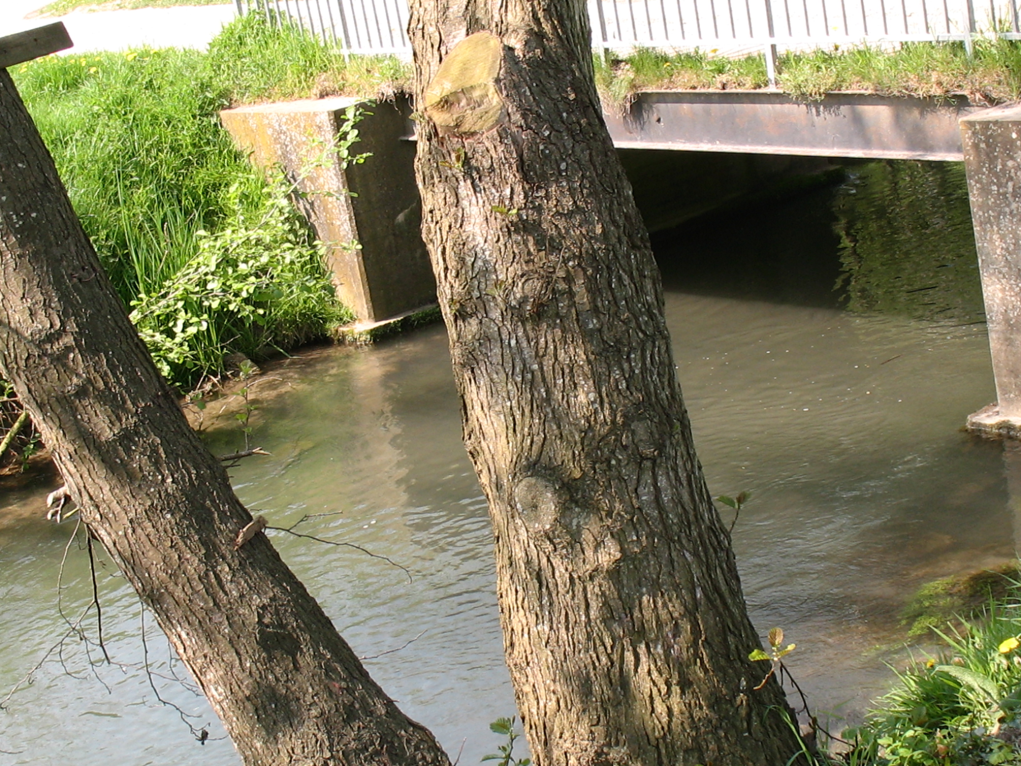 Ce pont sur l'Hallue, dans le marais de Querrieu, a été initialement établi en 1916 par l'armée britannique, d'où son nom "Pont des Anglais". Après plusieurs travaux visant à le consolider, il forme actuellement l'entrée principale conduisant au stade municipal.